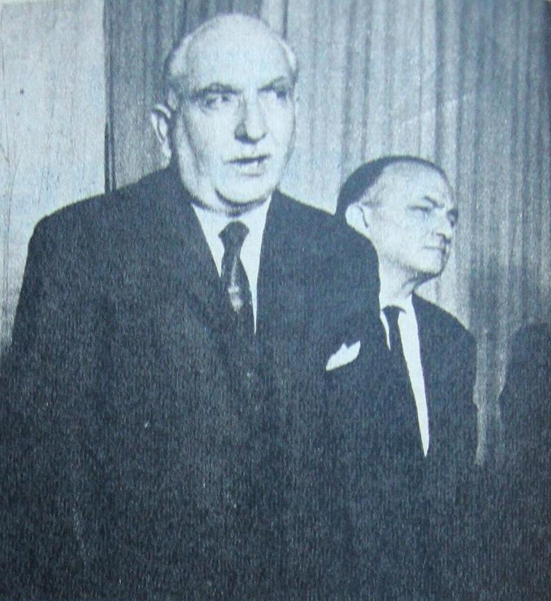 Los radicales Oscar Alende y Celestino Gelsi en 1965.